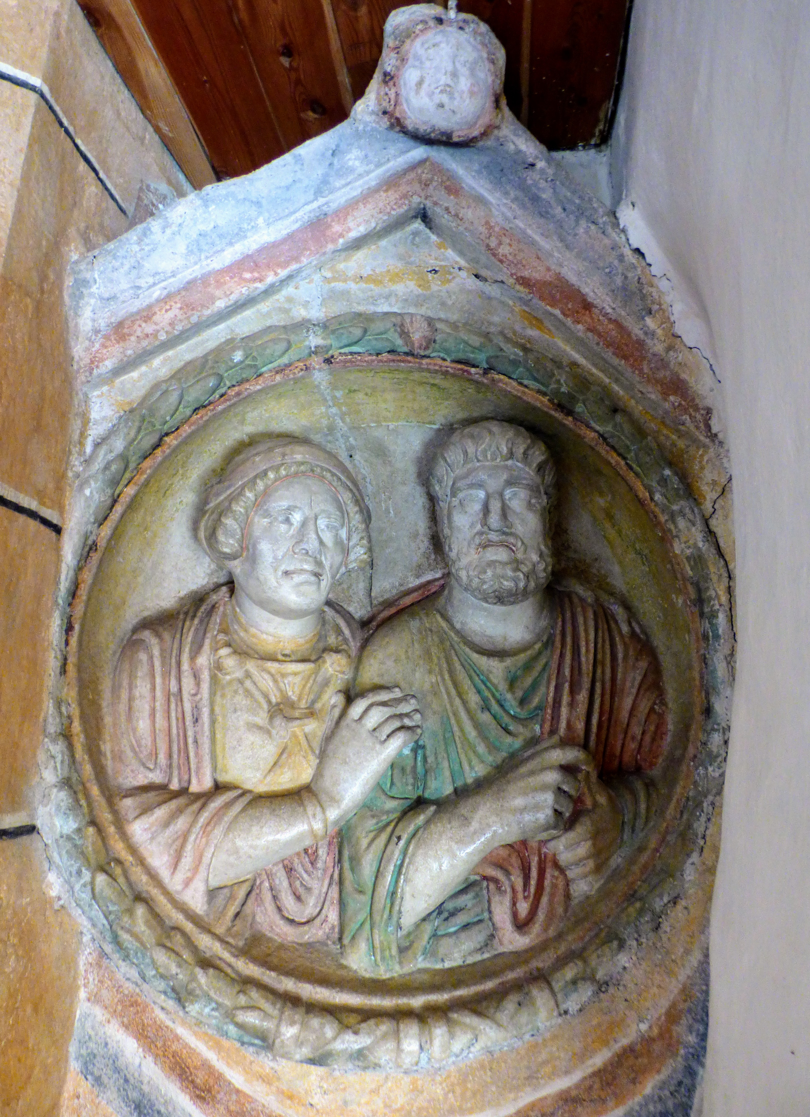 hervorragend erhaltenes spätrömisches Rundrelief in der Kath. Pfarrkirche hl. Martin, Greith (Gemeinde Neumarkt, Steiermark)